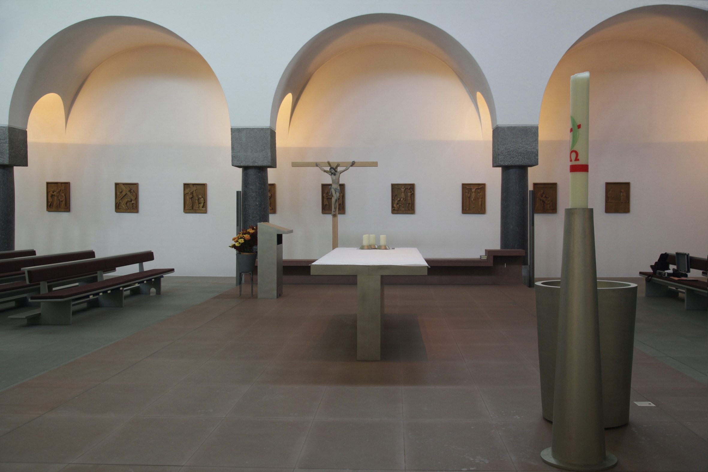 Römisch-katholische Pfarrkirche St. Franziskus Zürich-Wollishofen Altarraum von 2004